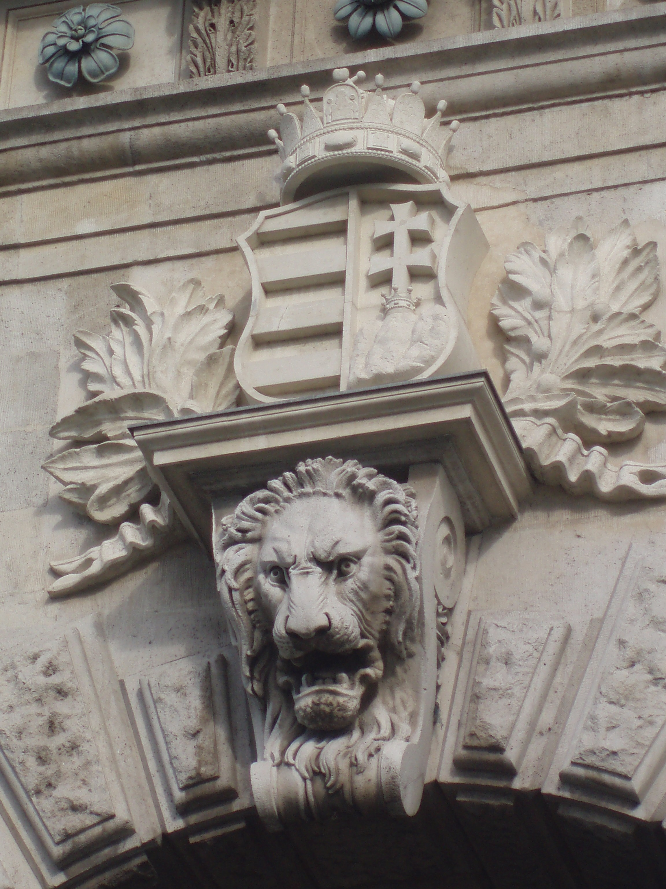 A Lánchíd pilléreinek kapuzata tetején látható címer az oroszlánfejjel